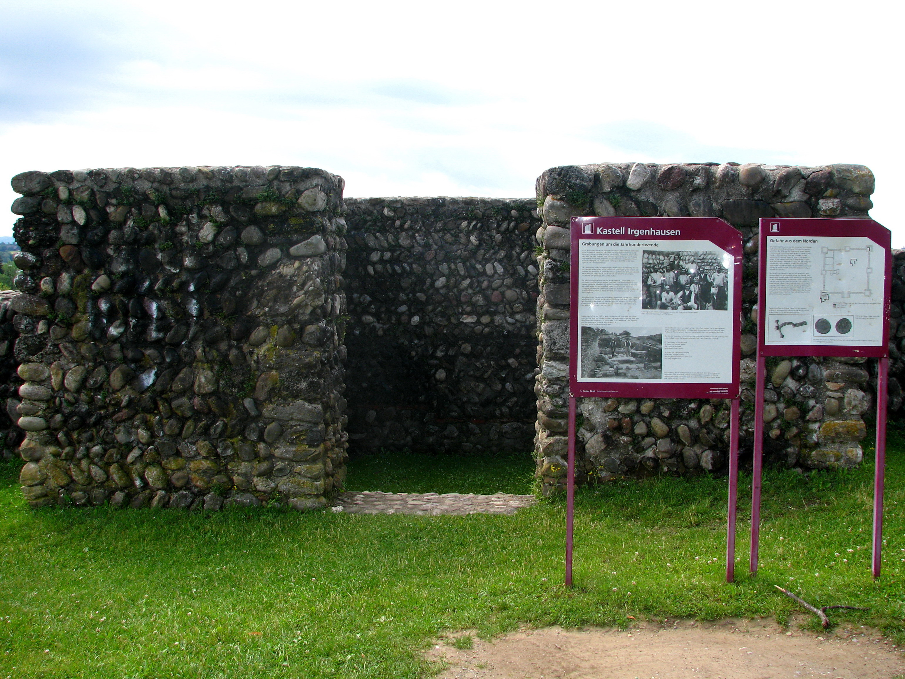 Römisches Kastell in Irgenhausen (Pfäffikon), Informationstafel